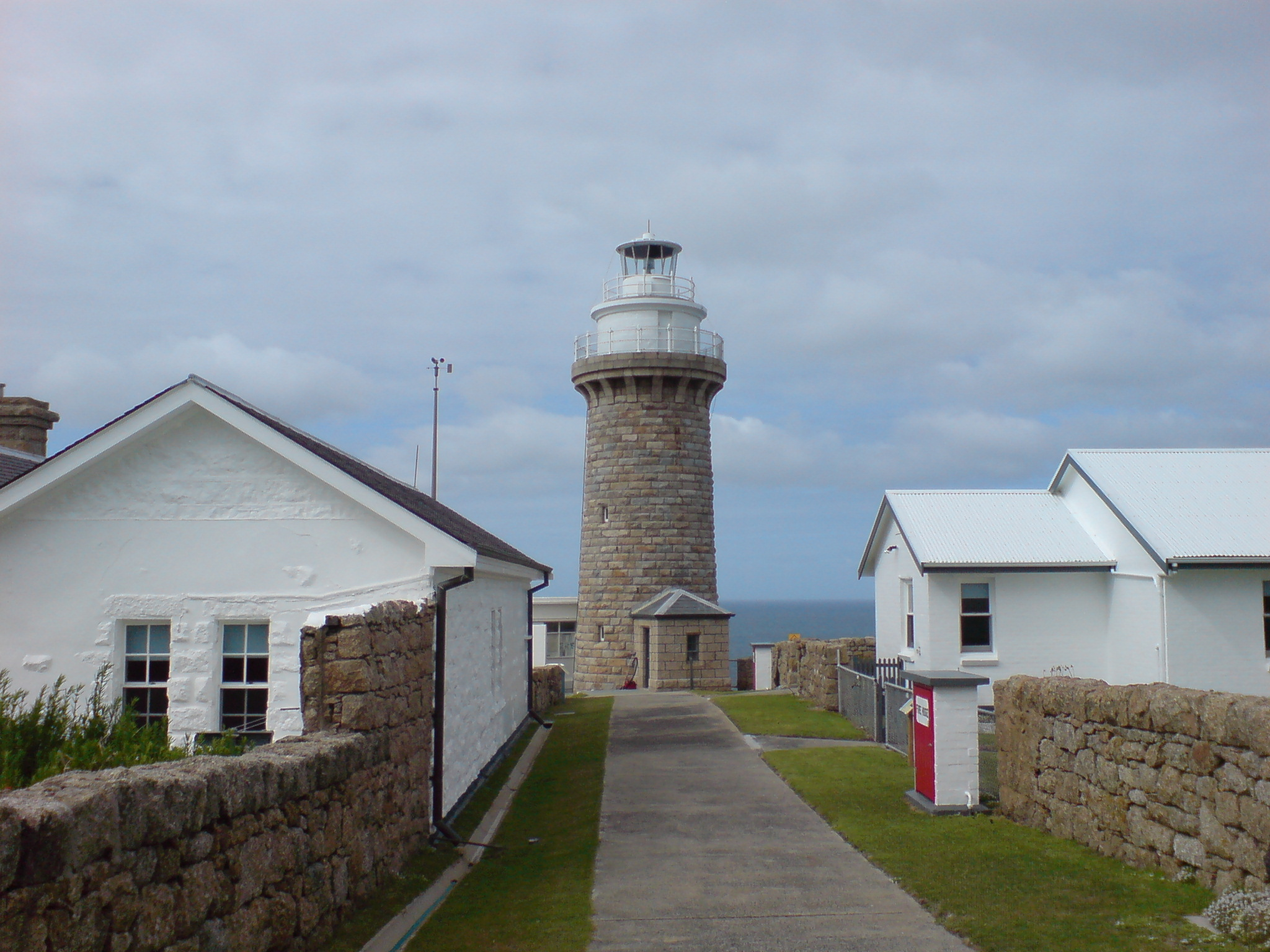 Le phare de la péninsule Wilsons.